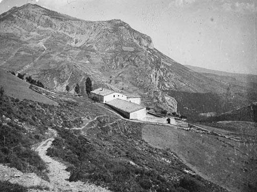 Imatge